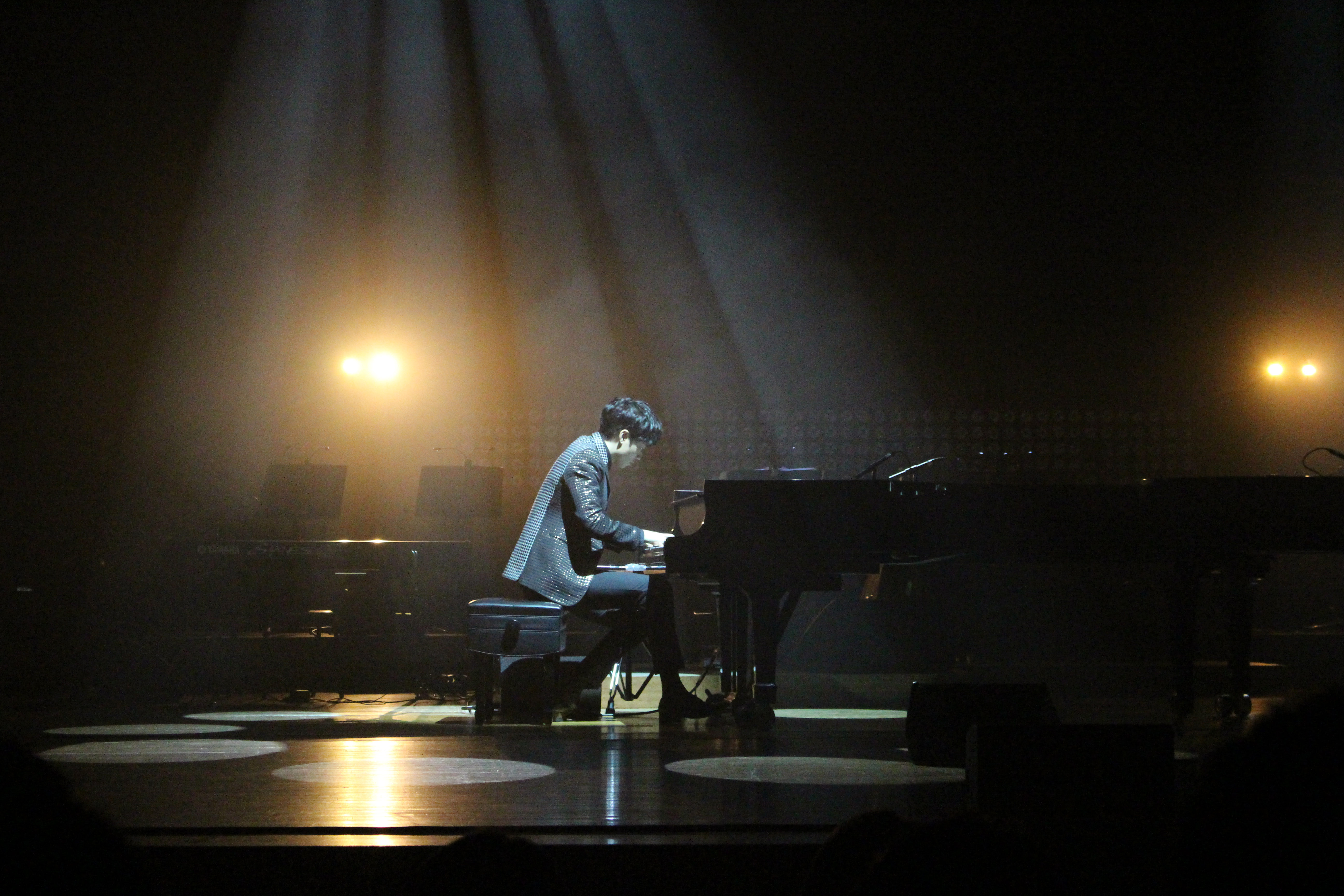 2015년 3월 6일 과천시민회관 대극장에서 열린 콘서트 ‘The Romantist’에서 피아니스트 윤한이 피아노를 연주하고 있다.